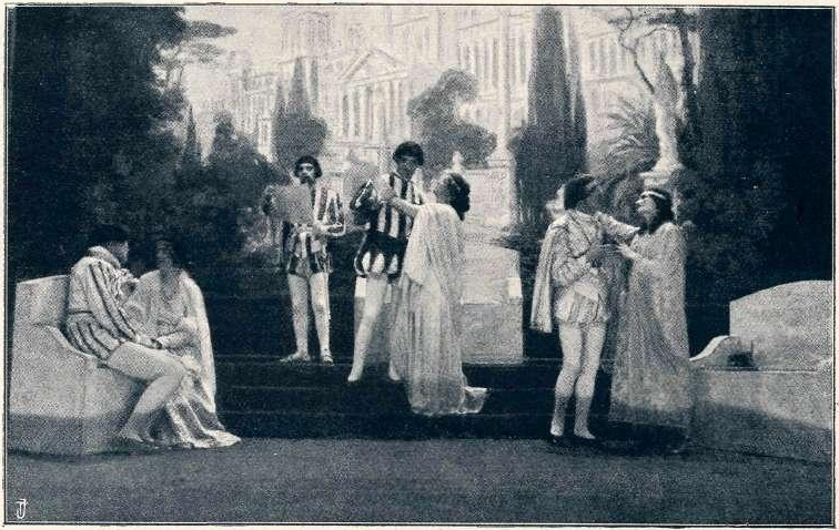 Slika s predstave Ljubljanske drame William Shakespeare - Beneški trgovec